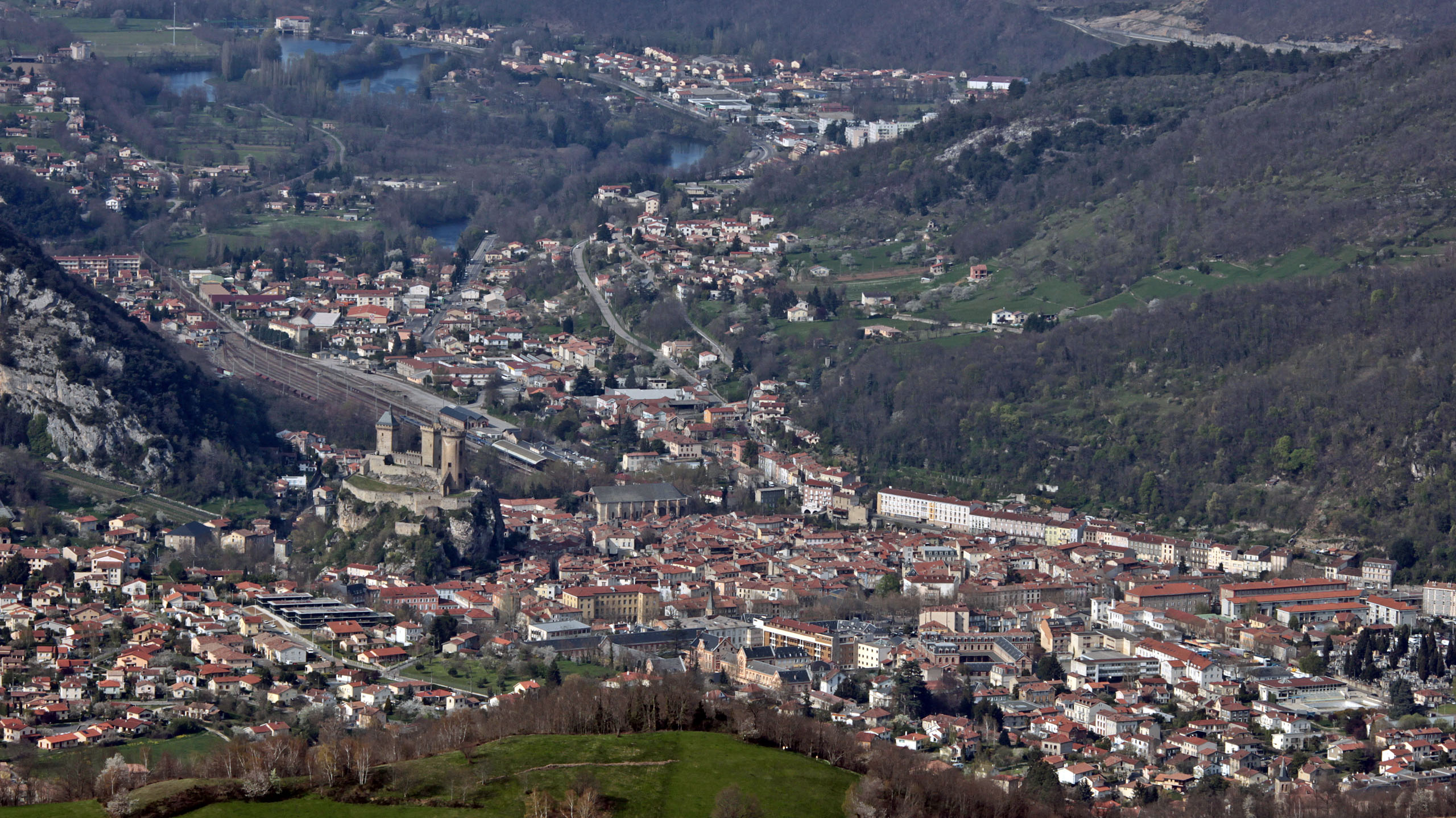 Vue générale